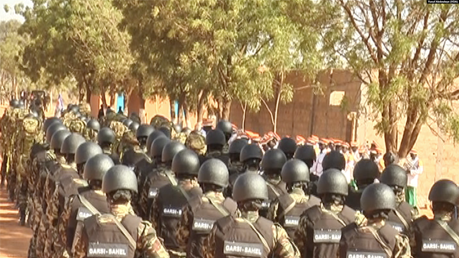 Hausa: Jami'an Tsaron Jamhuriyar Nijar